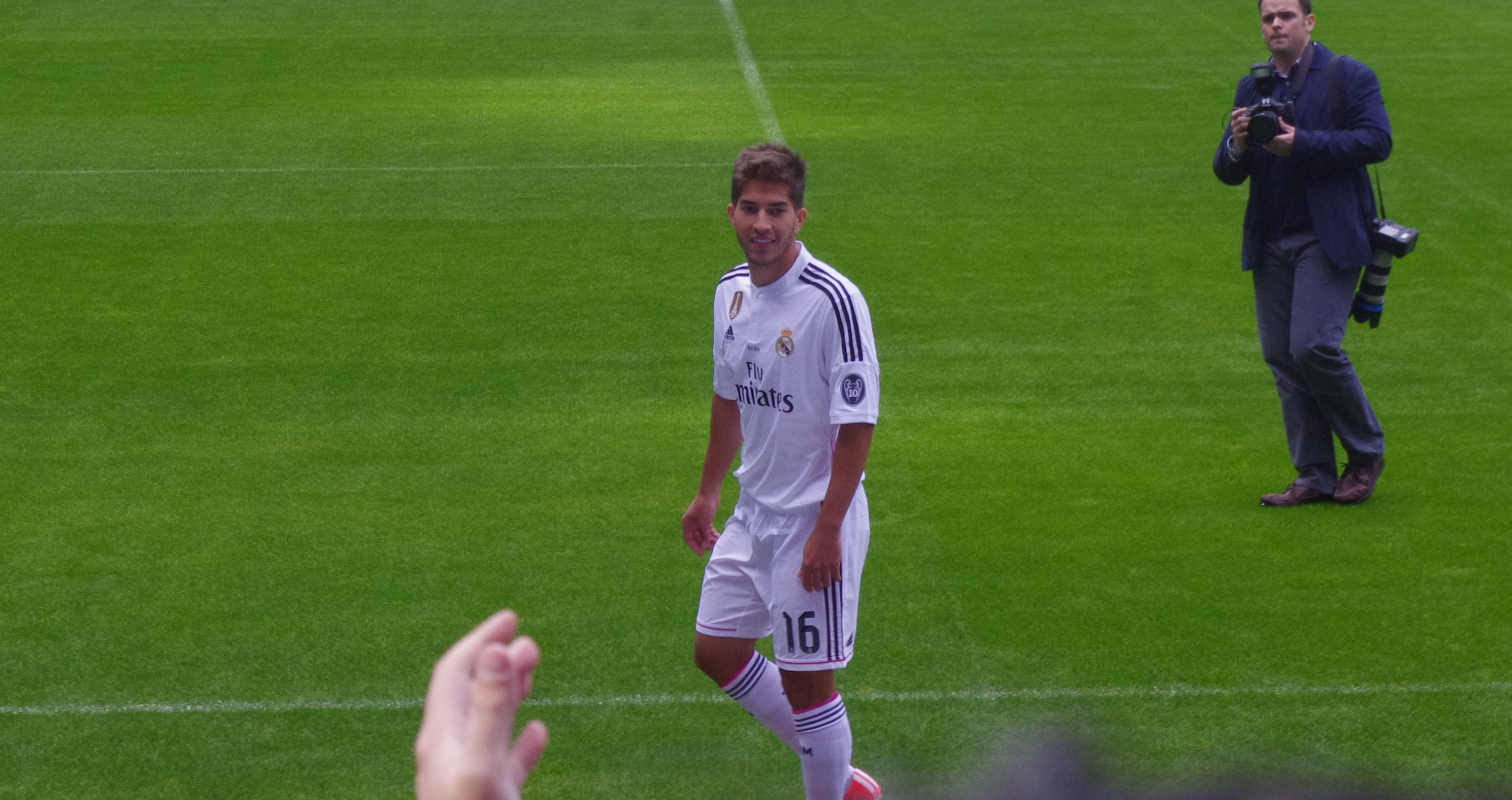 Présentation de Lucas Silva au Santiago Bernabeu le 26 janvier 2015